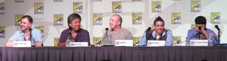 Los creadores y actores de la nueva serie animada Spectacular Spiderman